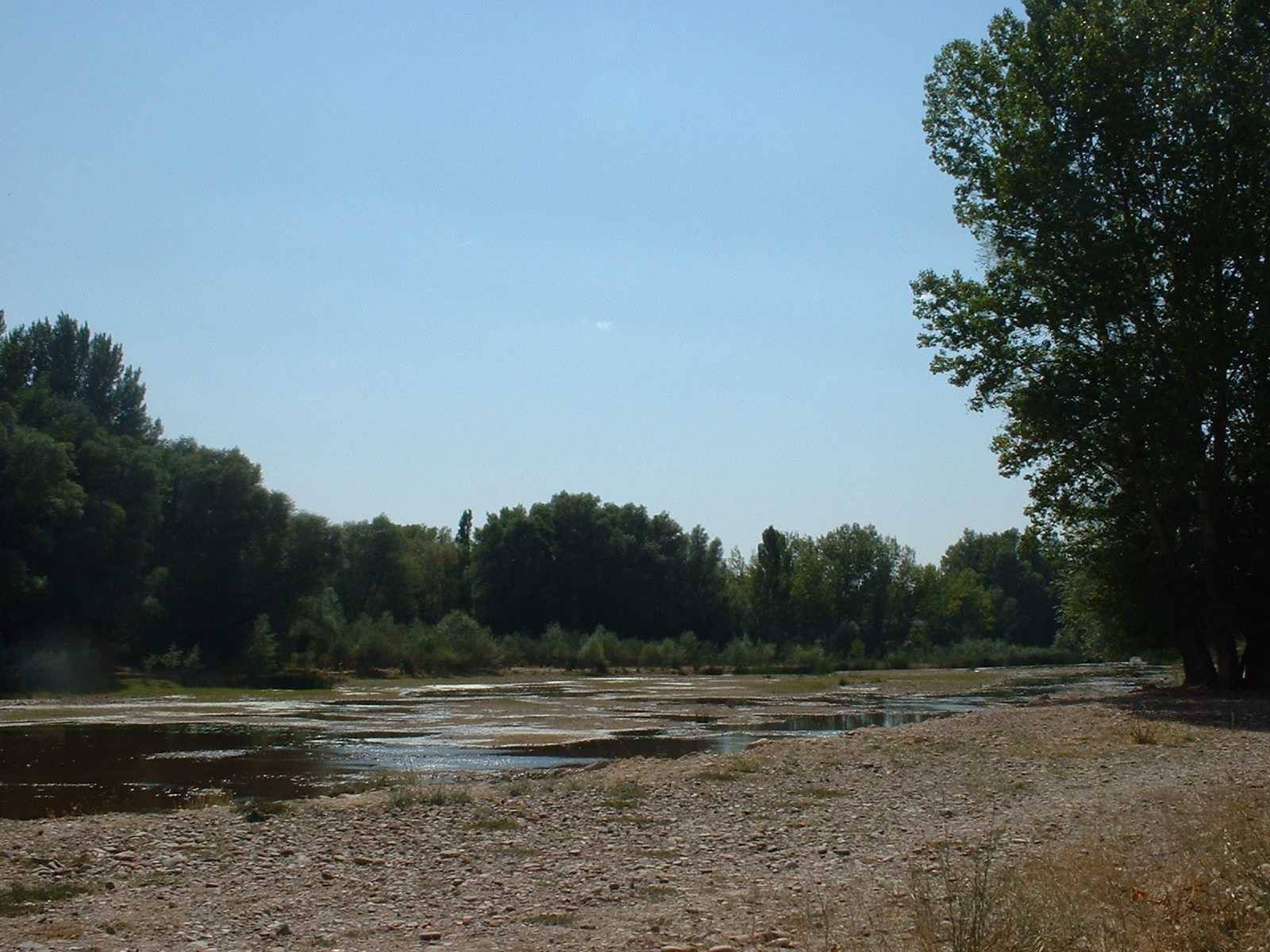 El Arlanza a su paso por Lerma